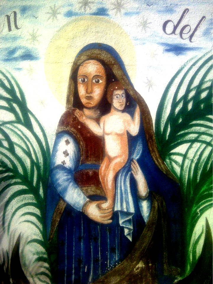 Mural popular que representa a la Virgen del Amparo,En una Calle de la Parroquia Pozuelo